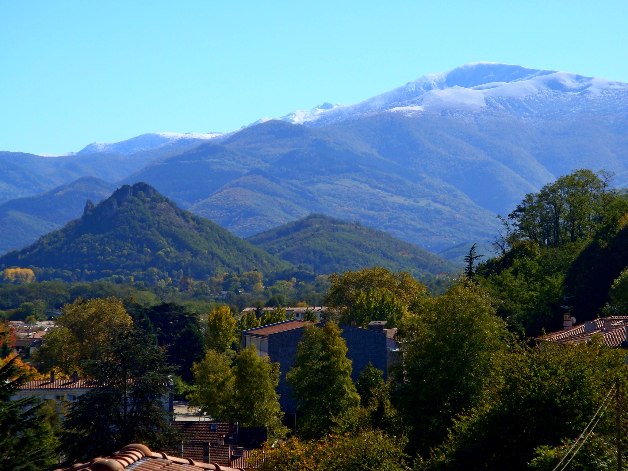 Widok na miasto Foix